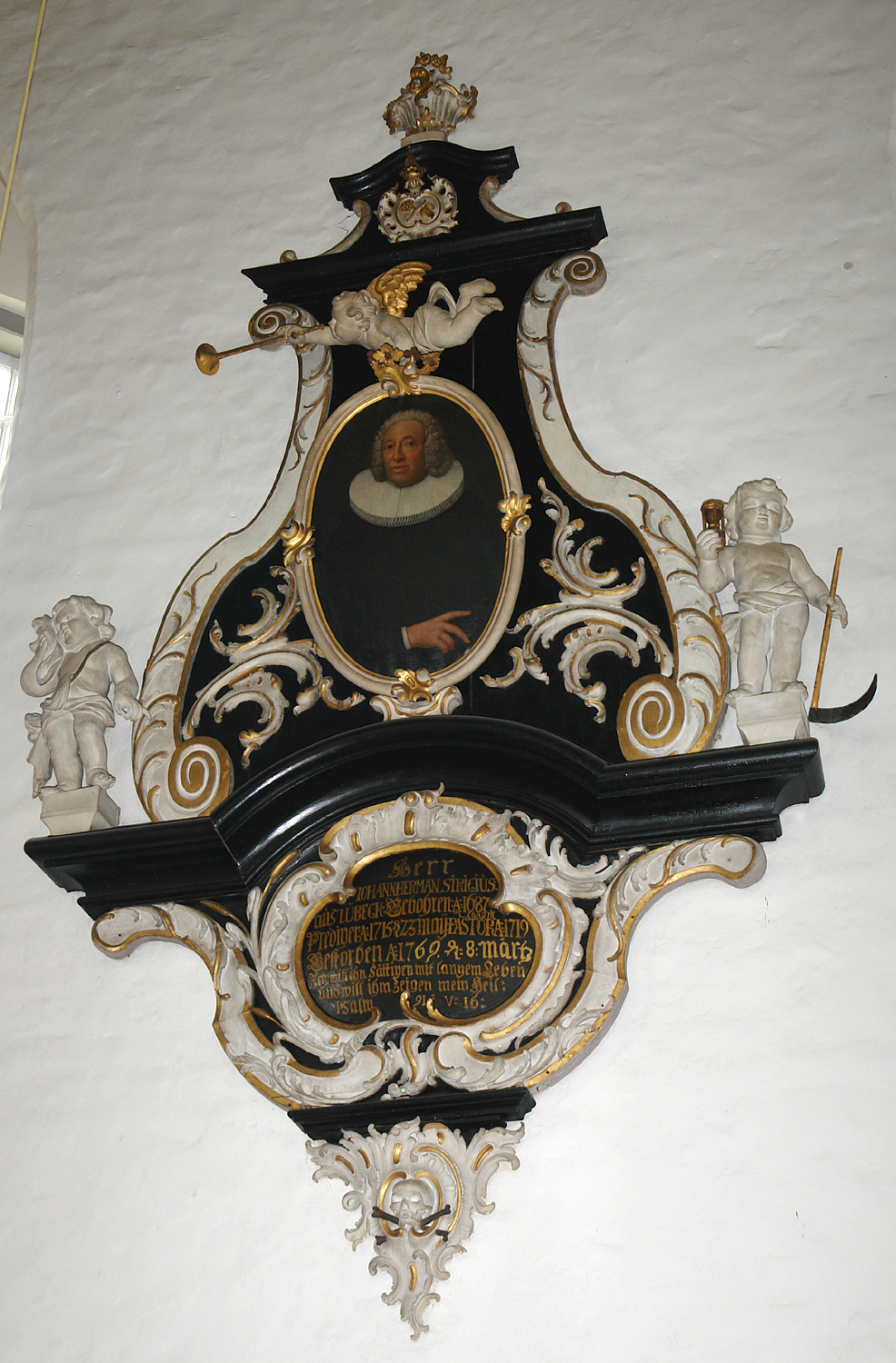 Kirche St. Lorenz (17.Jh.) in Lübeck-Travemünde: Epitaph des Pastors Johann Hermann Siricius, 1715-1769